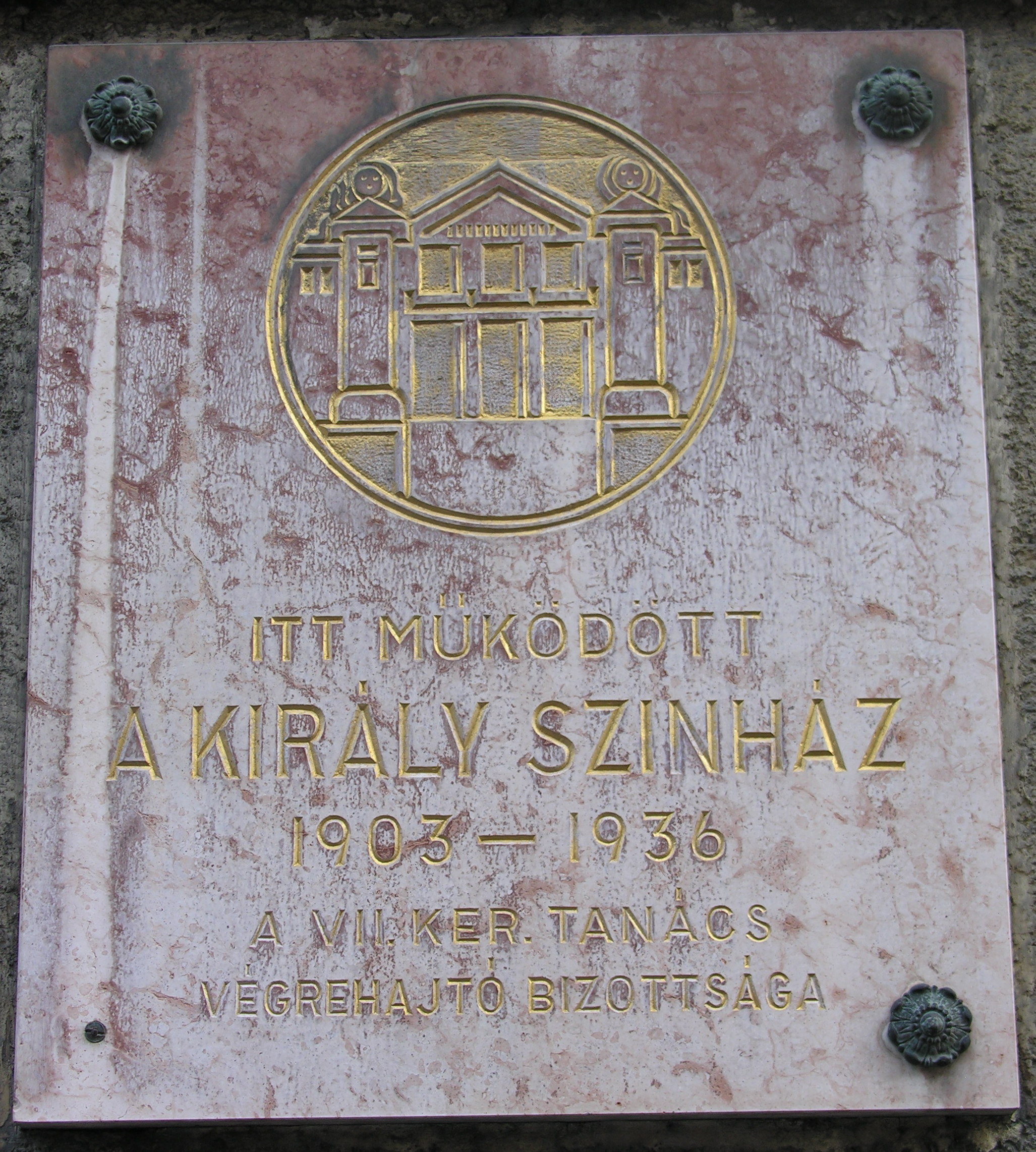 Király Színház emléktáblája, Budapest VII., Király utca 71.